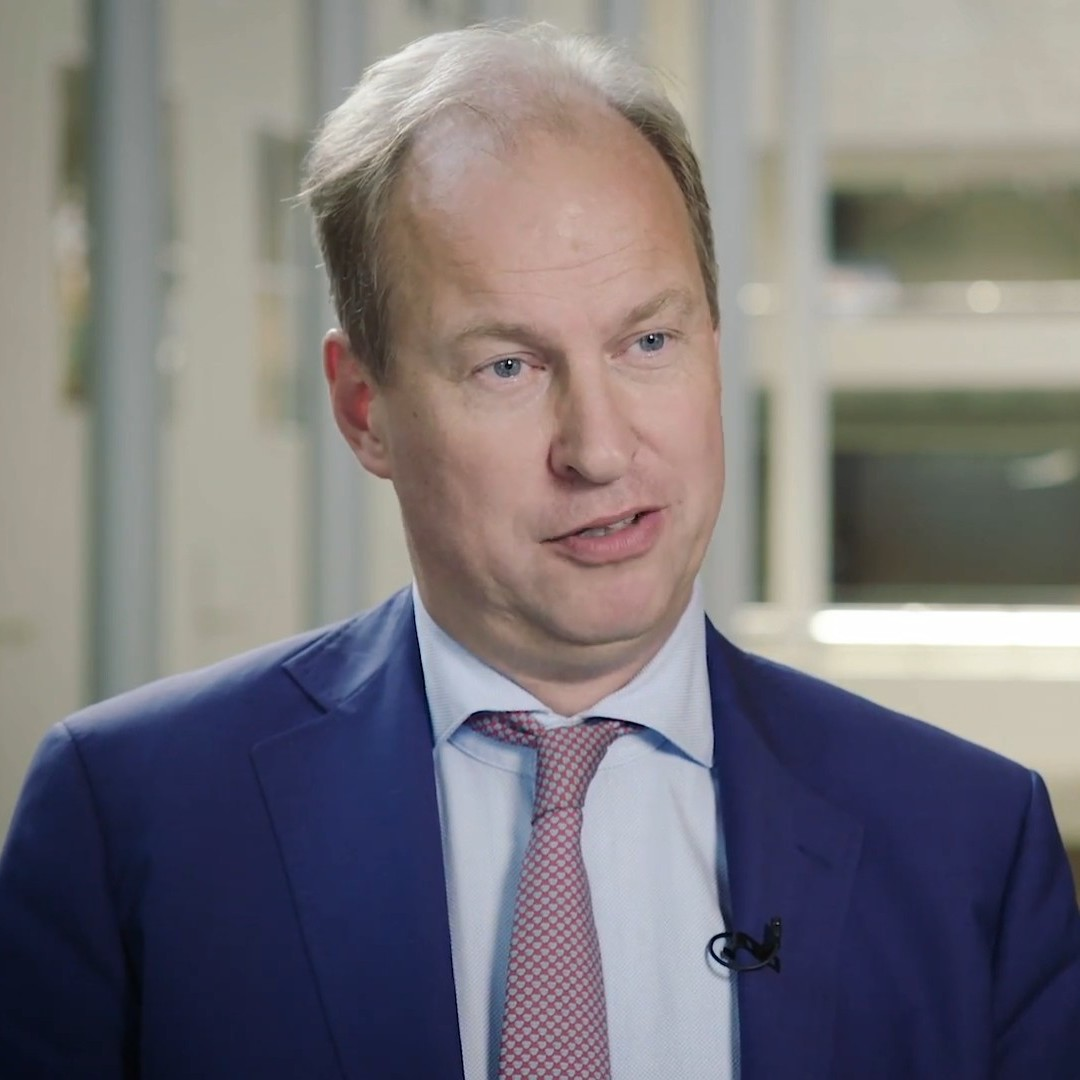 Wat doet de commissie voor Financiën? De commissie voor Financiën behandelt de onderwerpen waarvoor de minister van Financiën of de staatssecretaris van Financiën eerstverantwoordelijk is. Deze onderwerpen zijn grofweg onder te verdelen in financiële thema’s, waarvoor de minister verantwoordelijk is, en fiscale thema’s, waarvoor de staatssecretaris verantwoordelijk is.